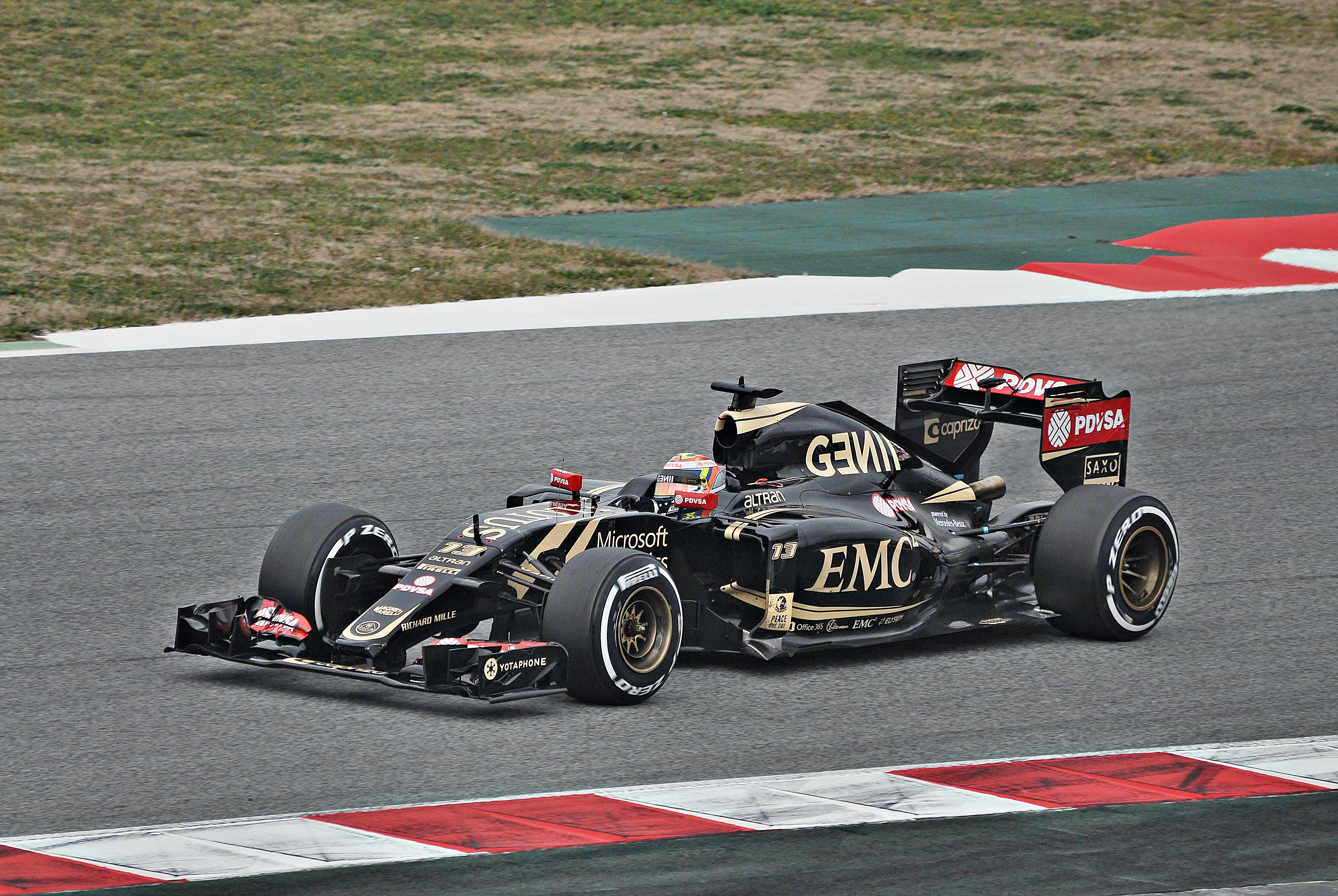 Test days Barcelona 2015